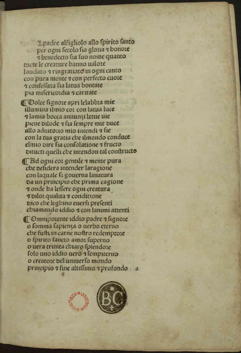 La Sfera. - [Gaeta] : [Andreas Freitag], [circa 1487]. - 18 c. ; a-c⁶ ; 4°.